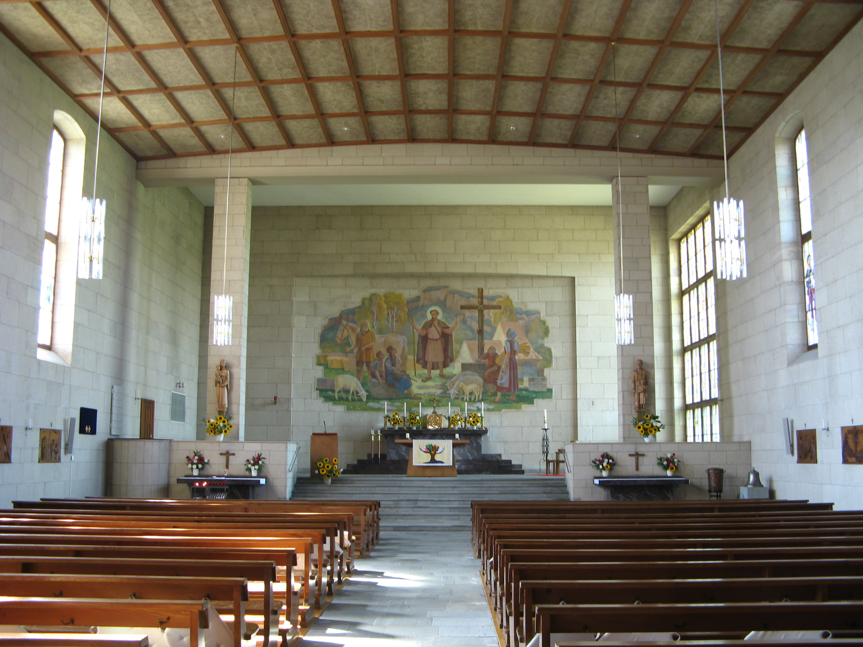 Innenansicht der Pfarrkirche St. Wendelin in Aristau, ID 909